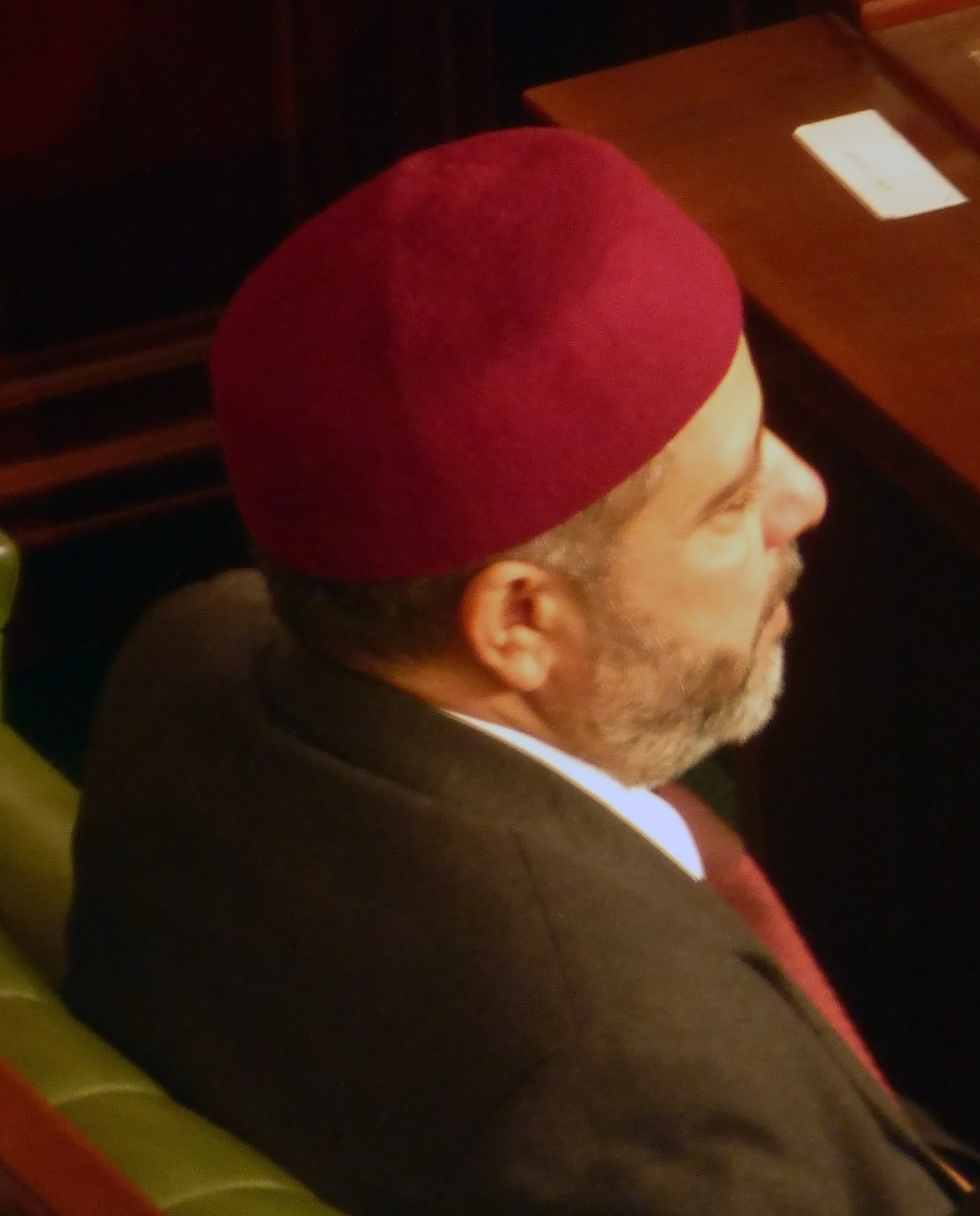 Noureddine El Khademi le Ministre des Affaires religieuses dans le gouvernement de Hamadi Jebali